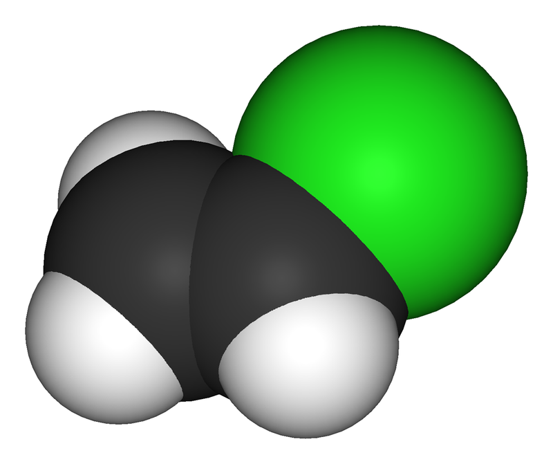 Vinilxlorid 3D